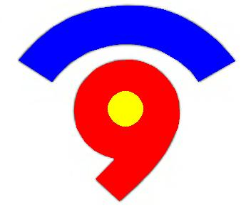 Antiguo logo de Canal 9 (1989-2005)